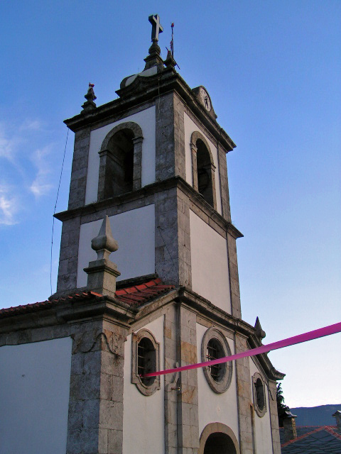 Igreja Paroquial da Parada (Paroquial da Parada Church), Parada de Ester, District of Viseu, Portugal